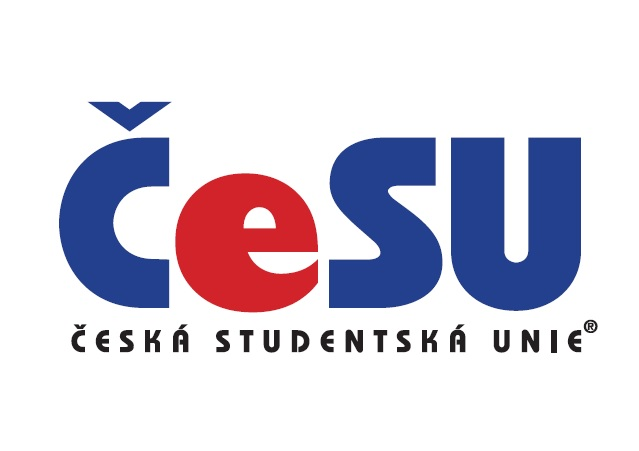 Toto je aktuální logo České studentské unie